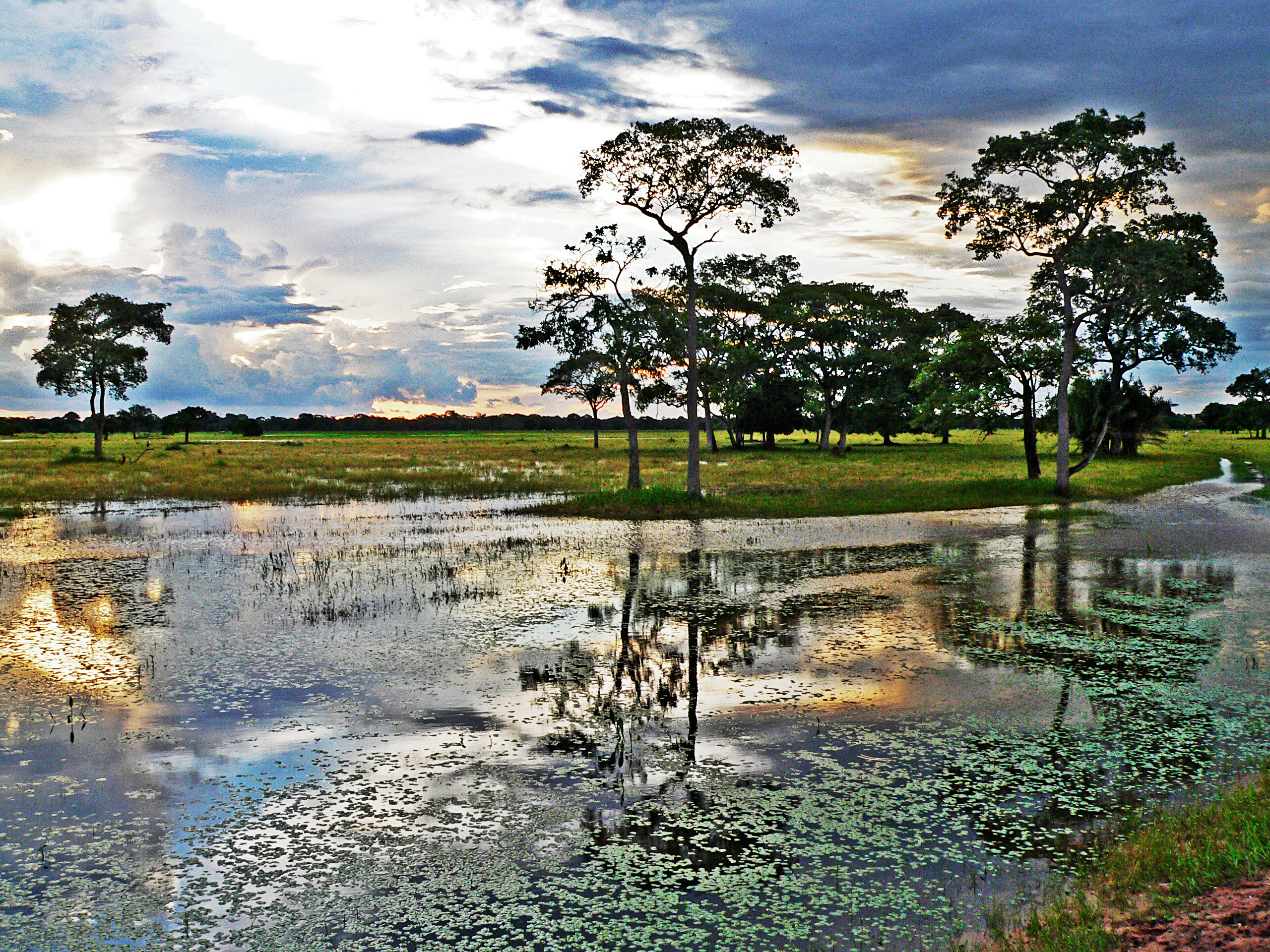 foto feita na pousada piuval localizada no municipio de poconé mt